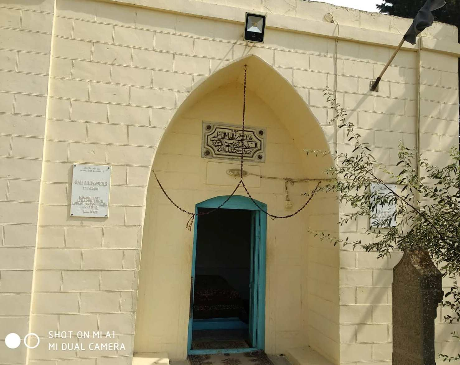 Əli Mirhəbib türbəsi. Mədəniyyət abidəsi kimi Dövlət tərəfindən qorunur